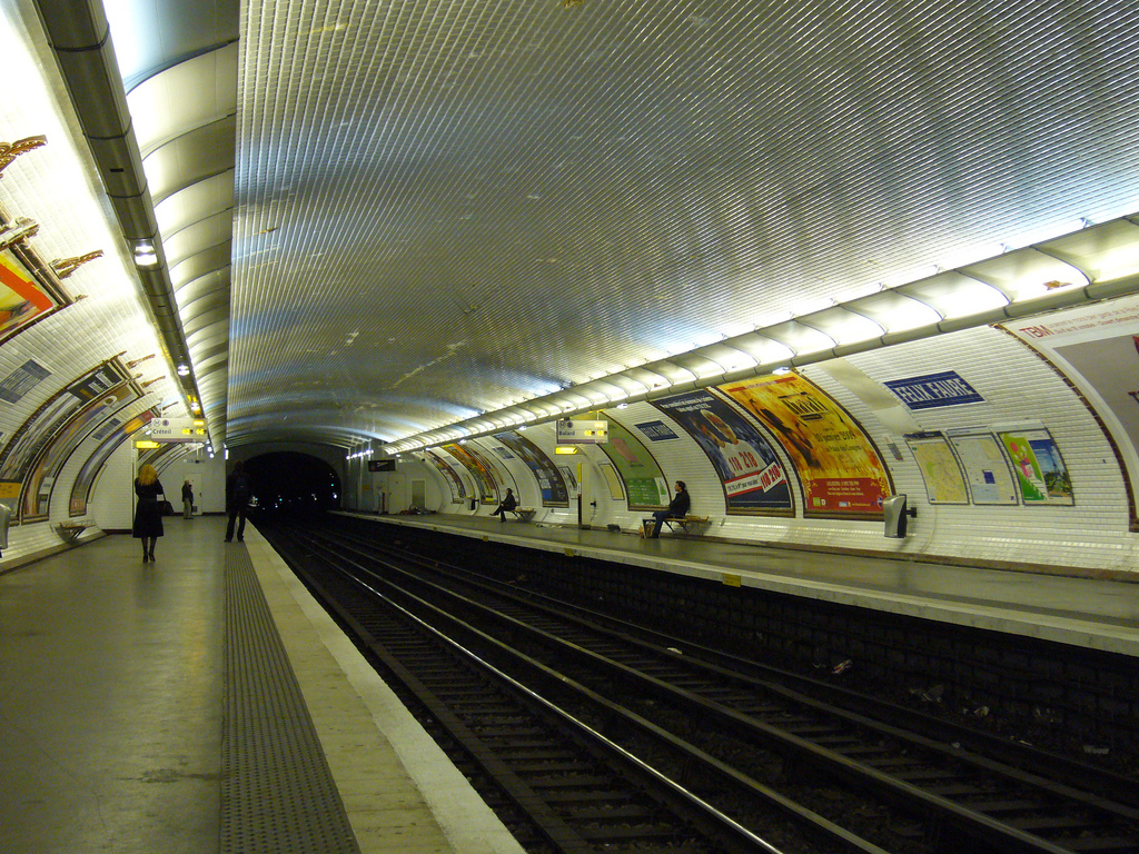 Station Félix Faure sur la ligne 8 du métro de Paris.